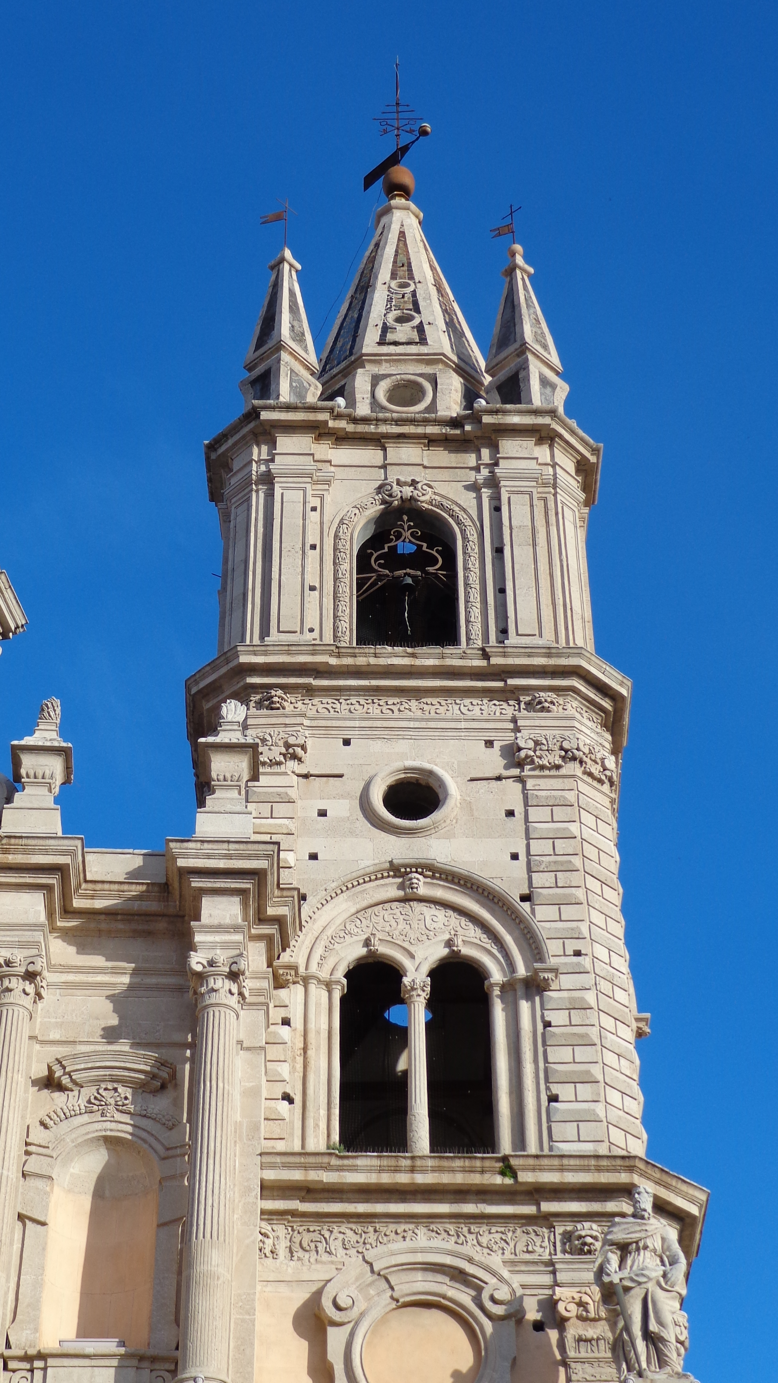 Campanile piazza duomo